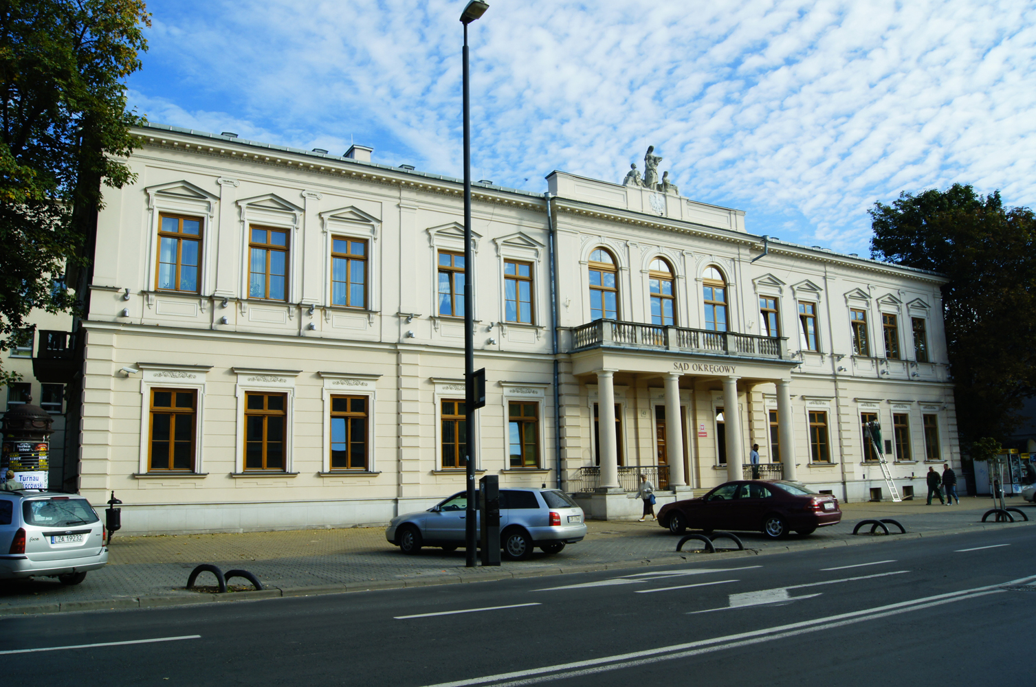 Lublin, ul. Krakowskie Przedmieście 43 - gmach Towarzystwa Kredytowego Ziemskiego (zabytek nr A/553 z 16.12.1971)